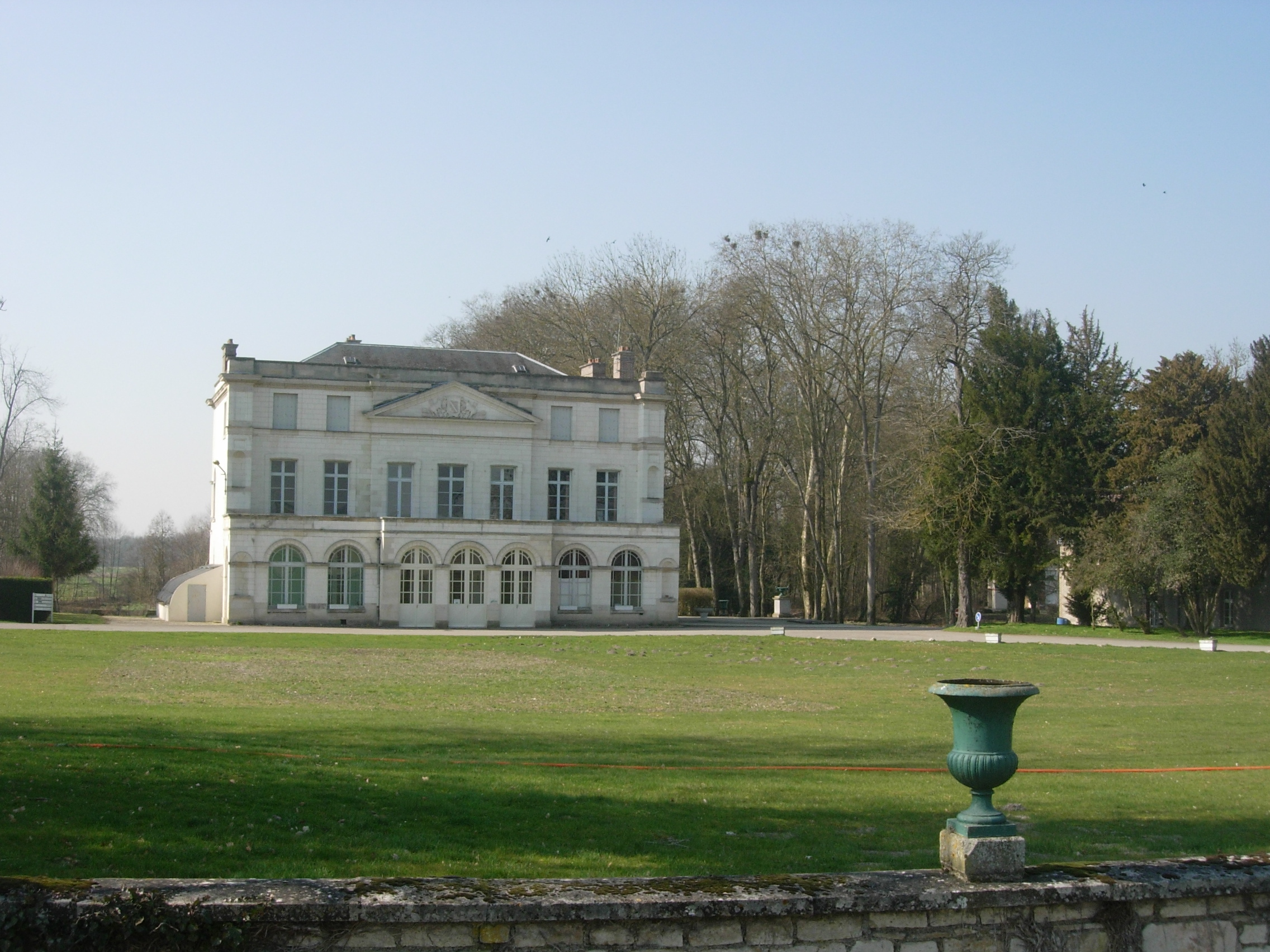 Château de Sainte-Maure (Aube) : de style Louis XIV, les ailes du bâtiment ont été rasées au début du XXème siècle.